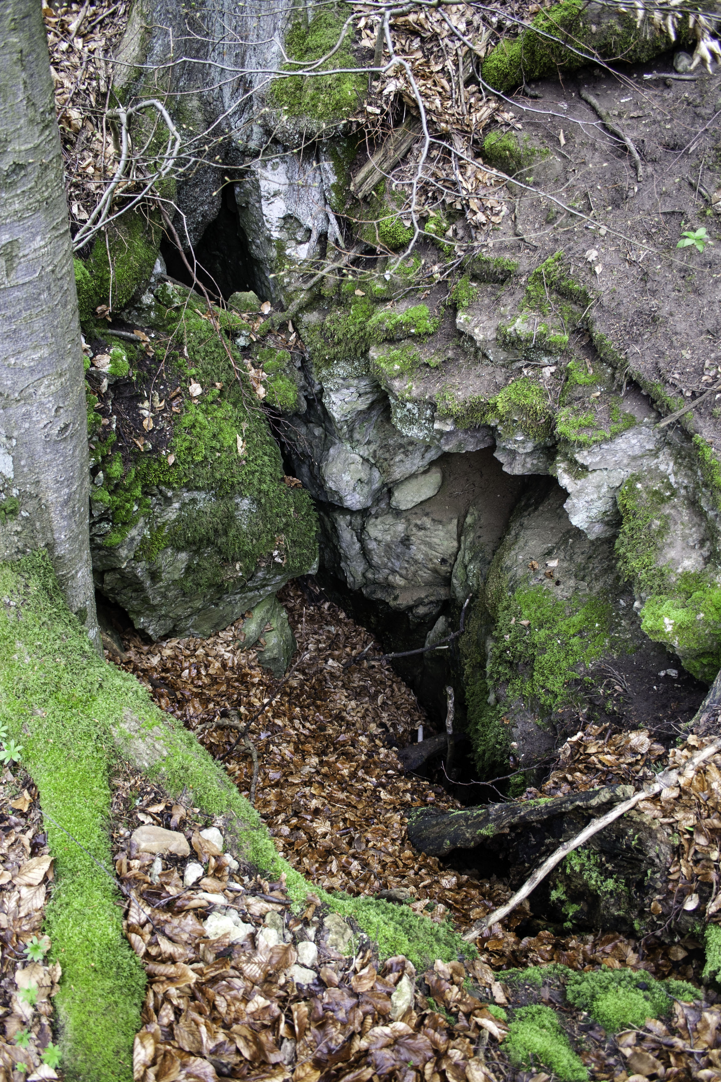 Geissloch bei Krottensee